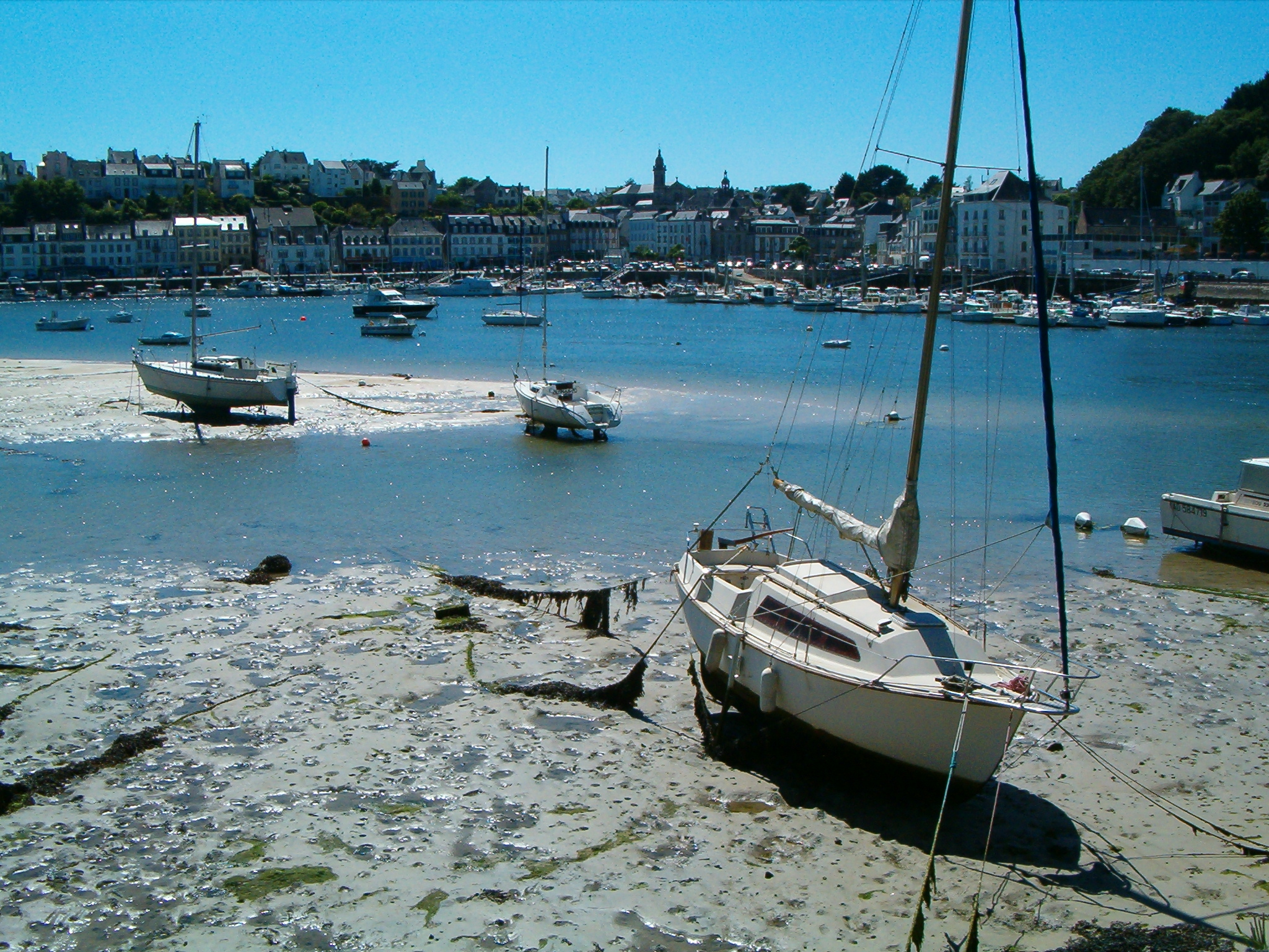 Audierne, Bretagne